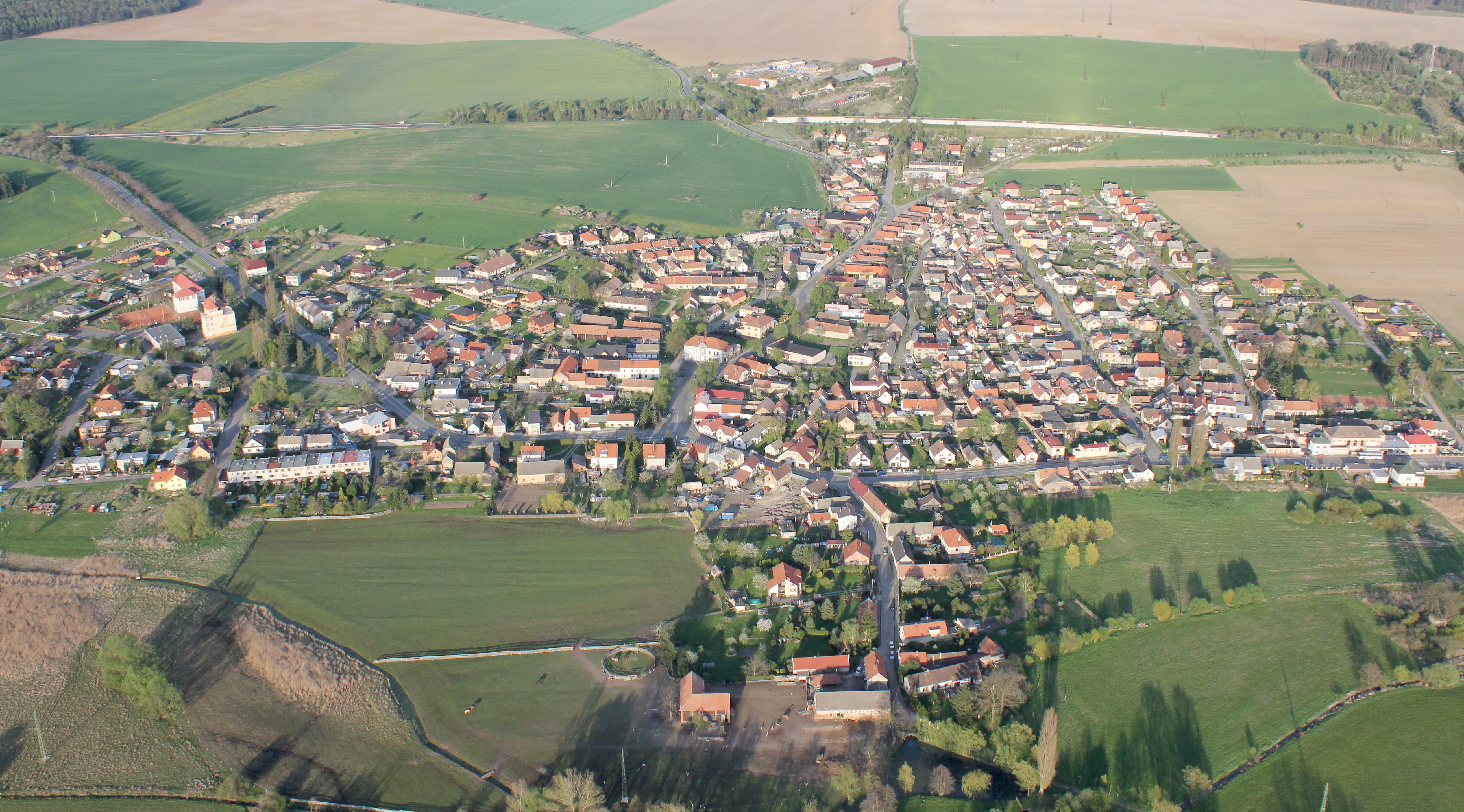 letecký snímek